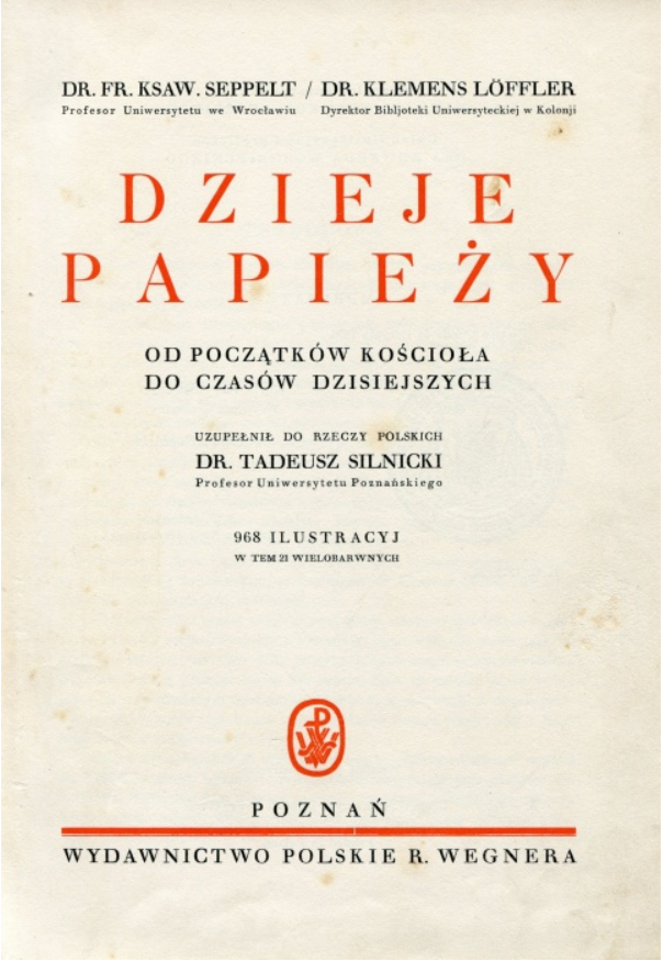 Strona tytułowa książki F.X. Seppelta i K. Löfflera "Dzieje Papieży", Wydawnictwo Polskie R. Wegner